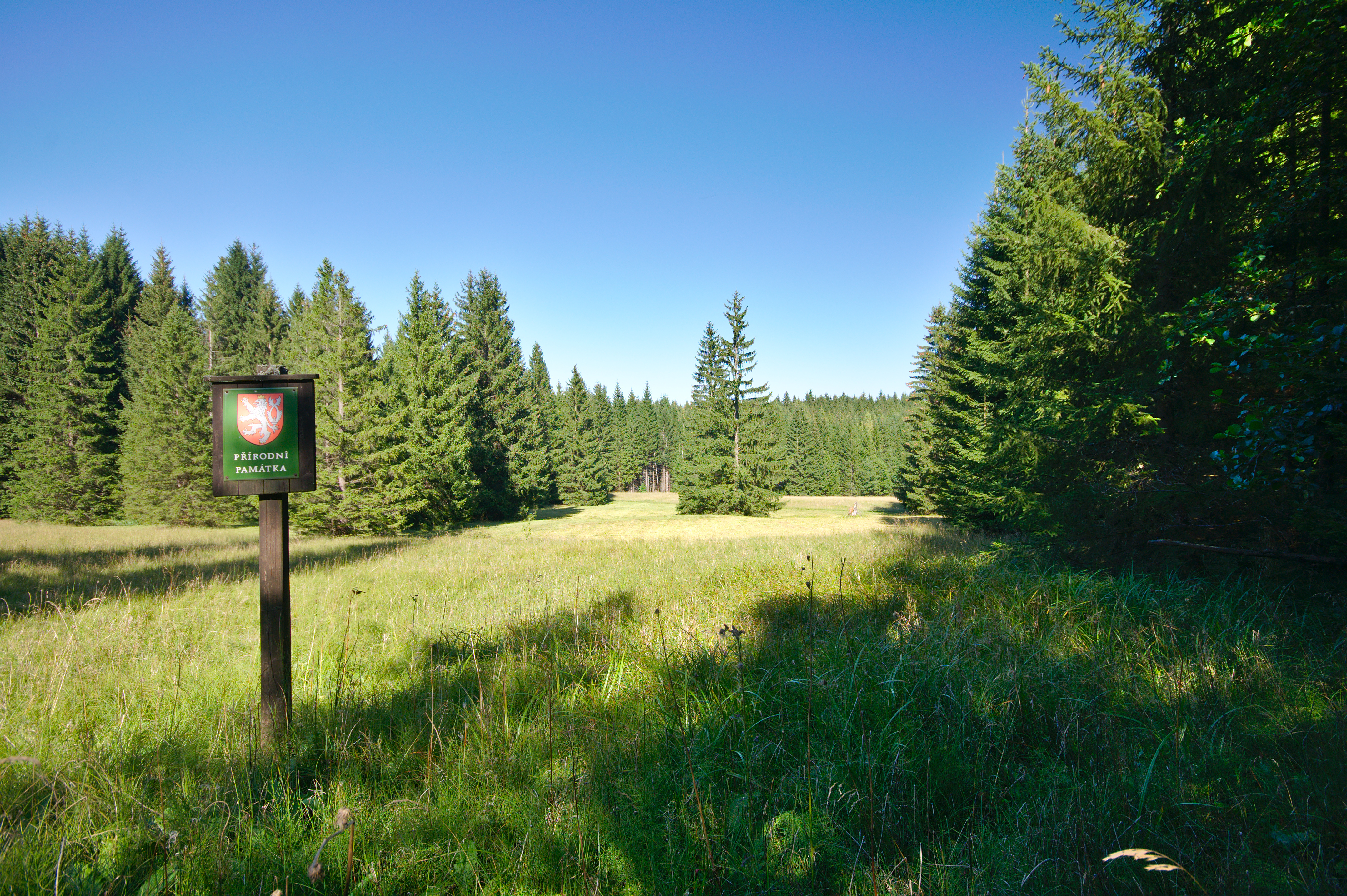 Přírodní památka Velká louka, okres Rychnov nad Kněžnou